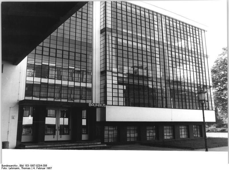 Dessau, Bauhaus ADN-ZB Lehmann 4.2.1987-Bi Bez. Halle: Bauhaus- Das Bauhaus-Gebäude Dessau, von Walter Gropius entworfen, wurde 1926 eingeweiht. Die Kunstschule, die bis 1933 bestand, orientierte auf praktikable Lösungen im Städtebau, für Architektur und Formgestaltung sowie auf qualitativ neue Verbindungen von Kunst, Technik und Produktion. Das Bauhaus, im II. Weltkrieg schwer beschädigt, wurde anläßlich seines fünfzigjährigen Bestehens am 6.12.1976 nach gründlicher Rekonstruktion als Architektur-Denkmal wieder der Öffentlichkeit zugänglich gemacht. Jetzt ist das Bauhaus Dessau Bildungs-, Forschungs- und Experimentierstätte. (siehe auch 1987-0204-305 und 1987-0204-307 bis 1987-0204-309)